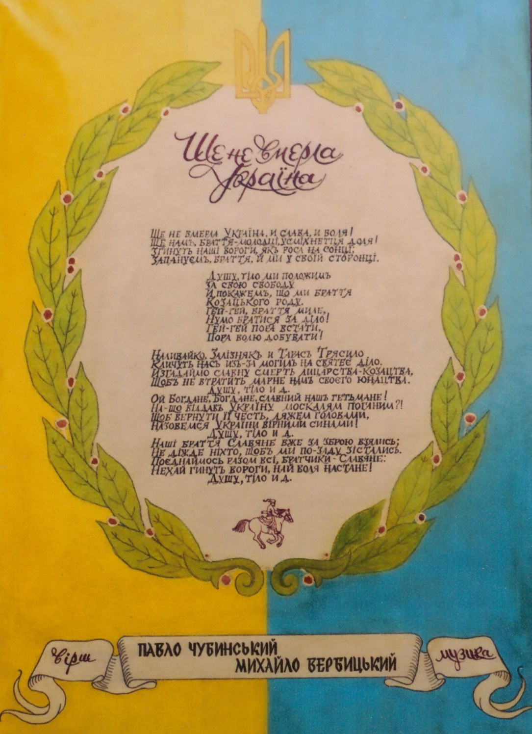 Плакат. Ще не вмерла Україна. Серія «Літературні пам’ятки України». 1999. Скульптор Таранченко В.О. Папір, туш, гуаш, бронзовий порошок, дерево. 60 х 43 х 2,5.